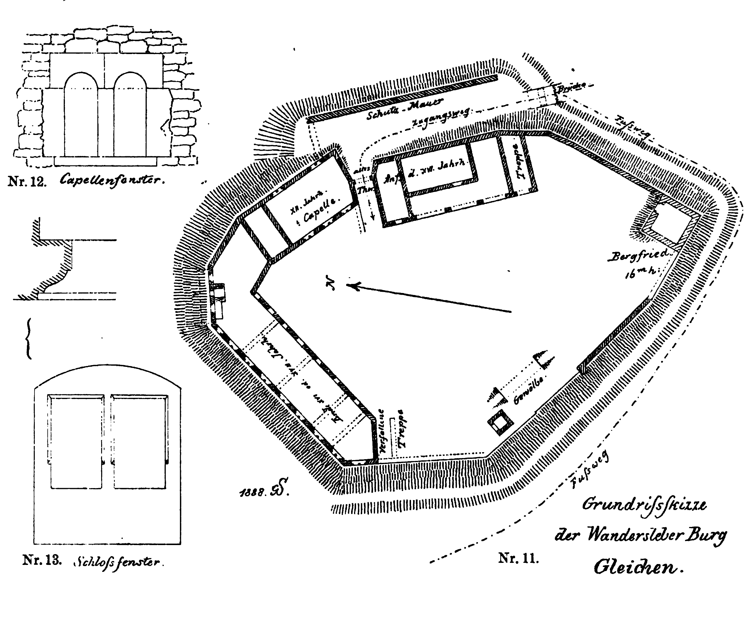 Lageplan der Burg Gleichen und weitere Illustrationen.